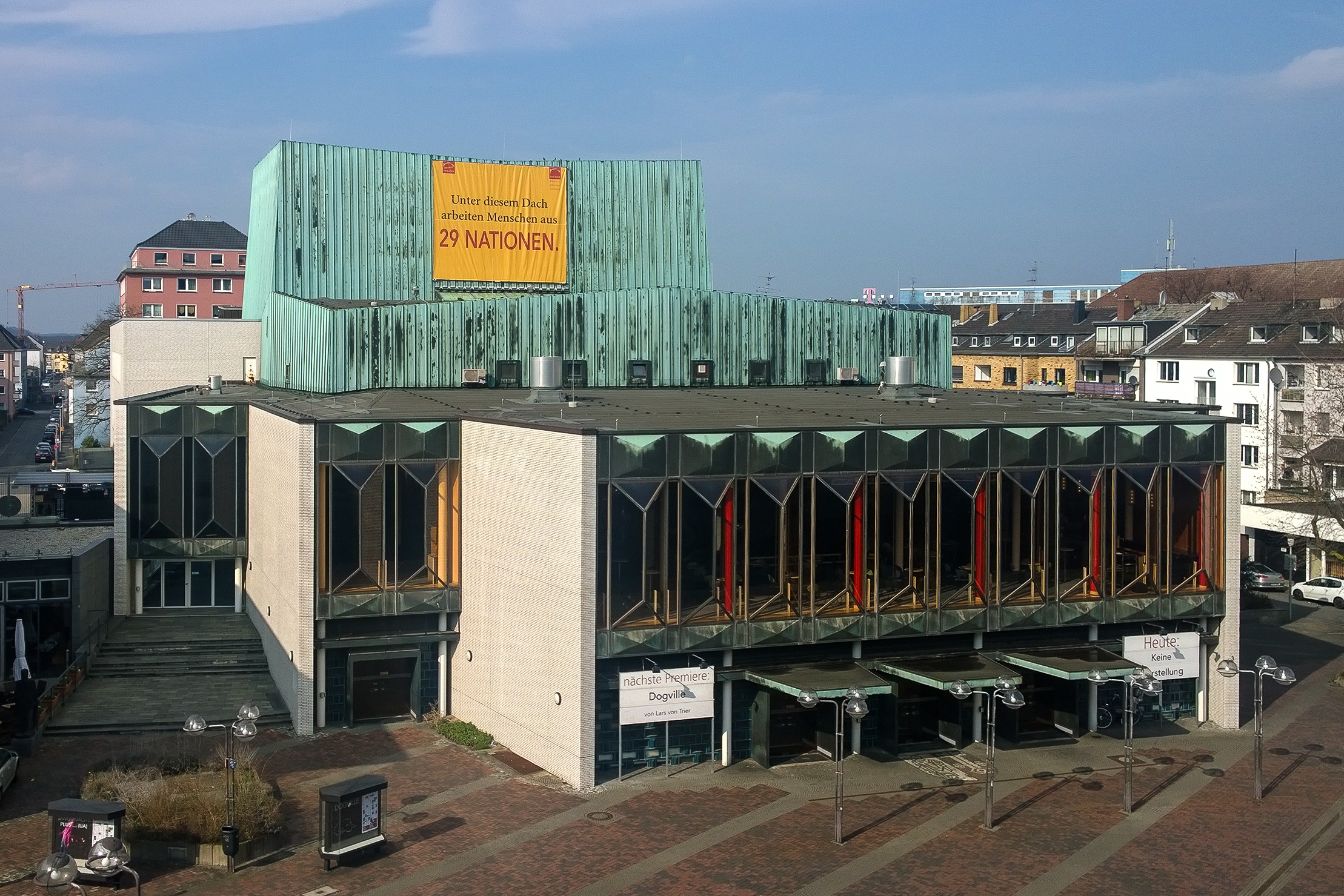 Stadttheater Krefeld, nach einem Entwurf von Professor Gerhard Graubner; Architekt Paul Kesseler, eröffnet 1963